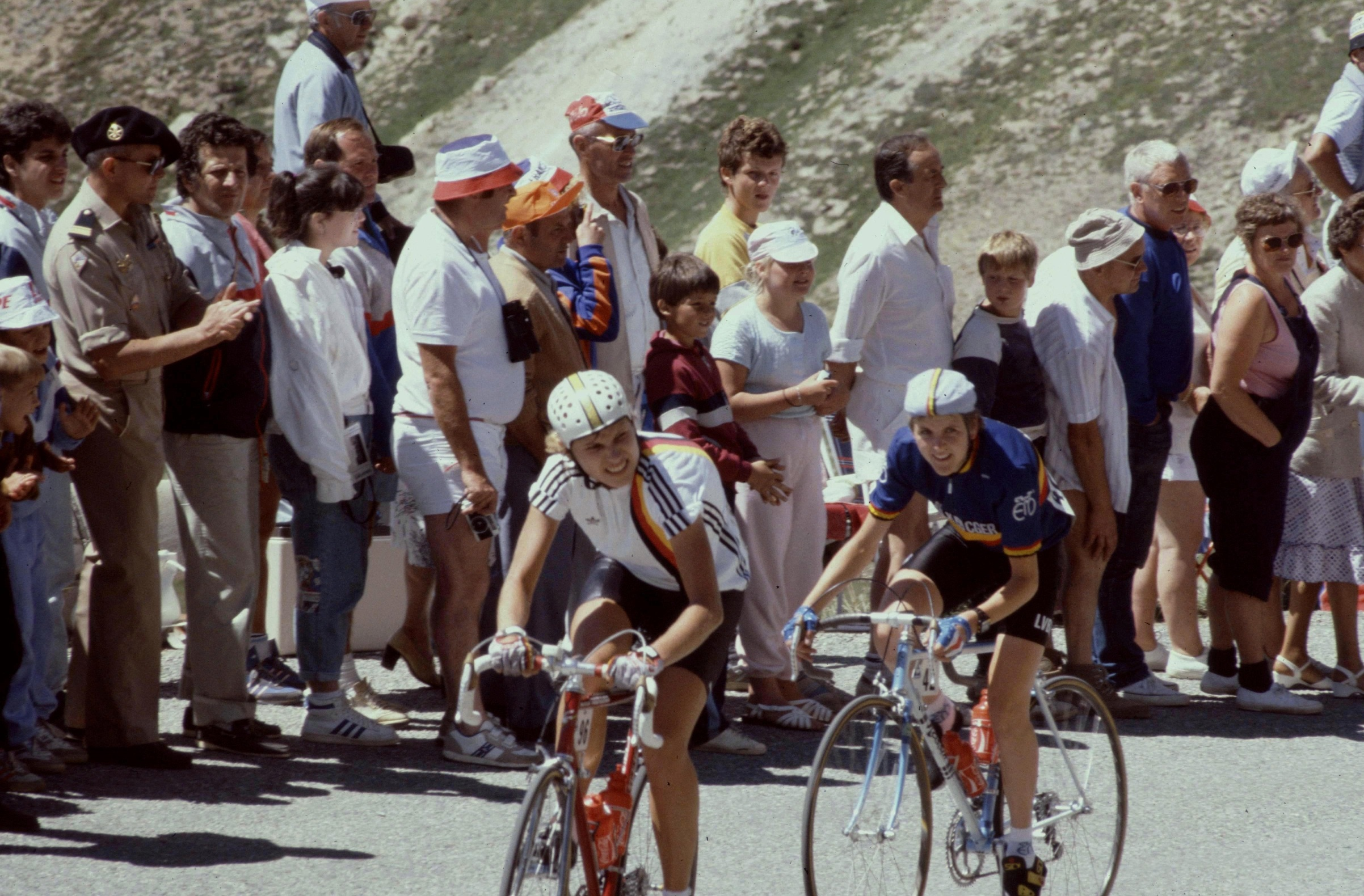 Hautes-Alpes Col De L'Izoard Tour de France Feminin 071986